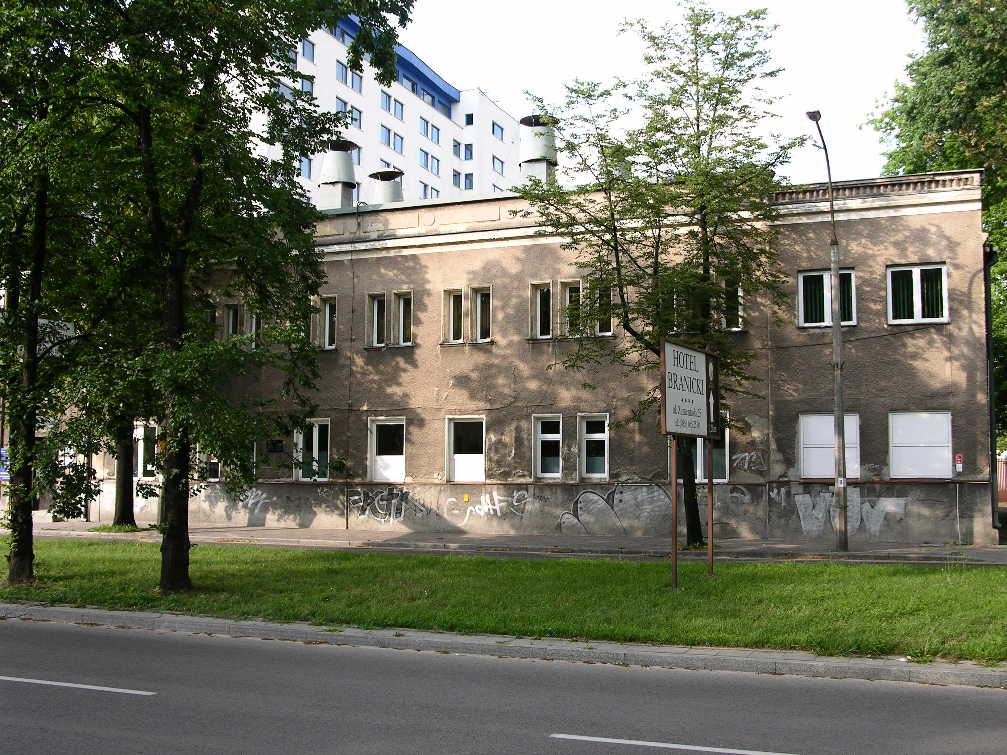 Beit Szmuel Synagogue in Białystok